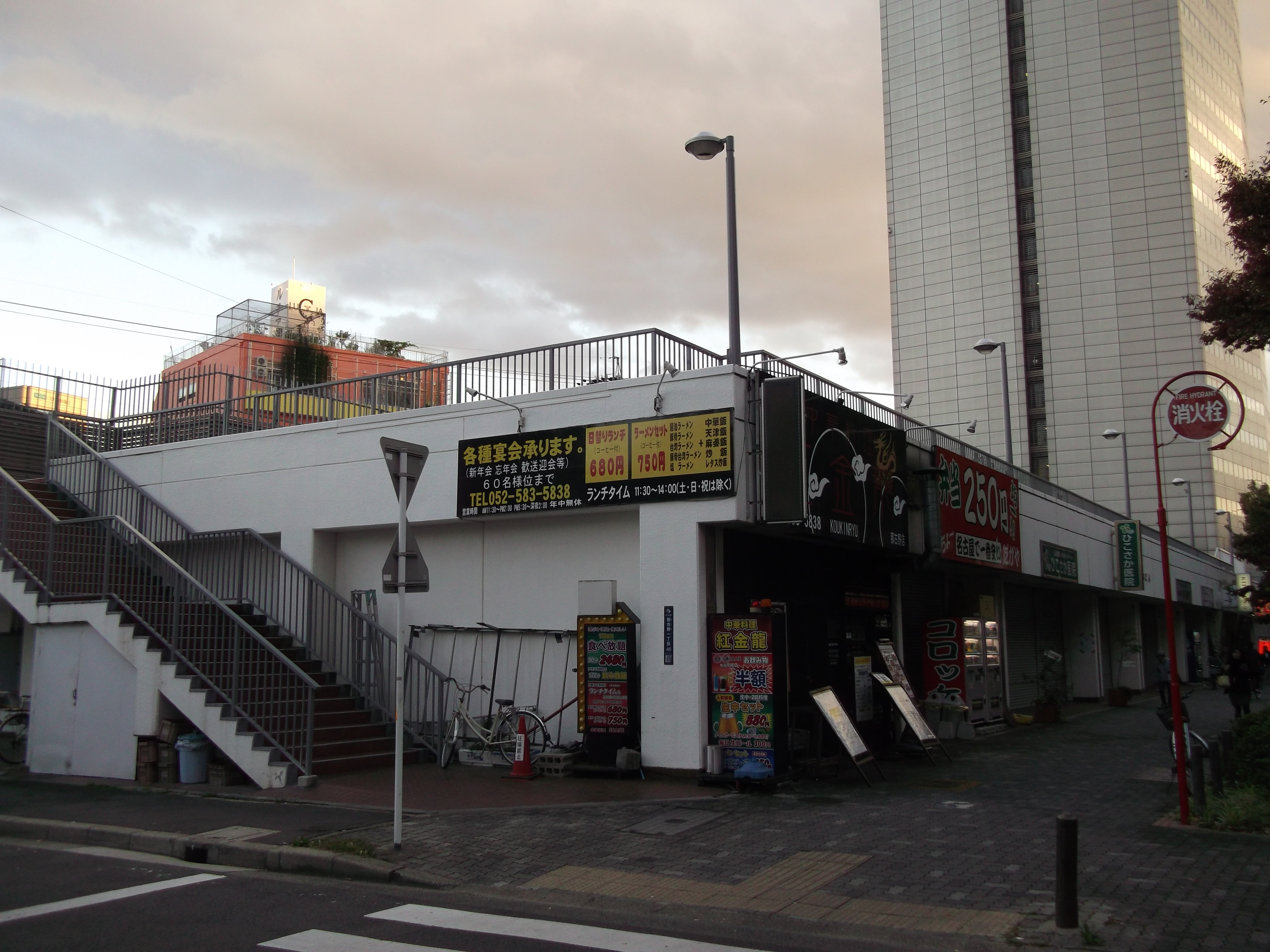 名古屋市中村区那古野の小鳥ビルを西側公道北側より撮影